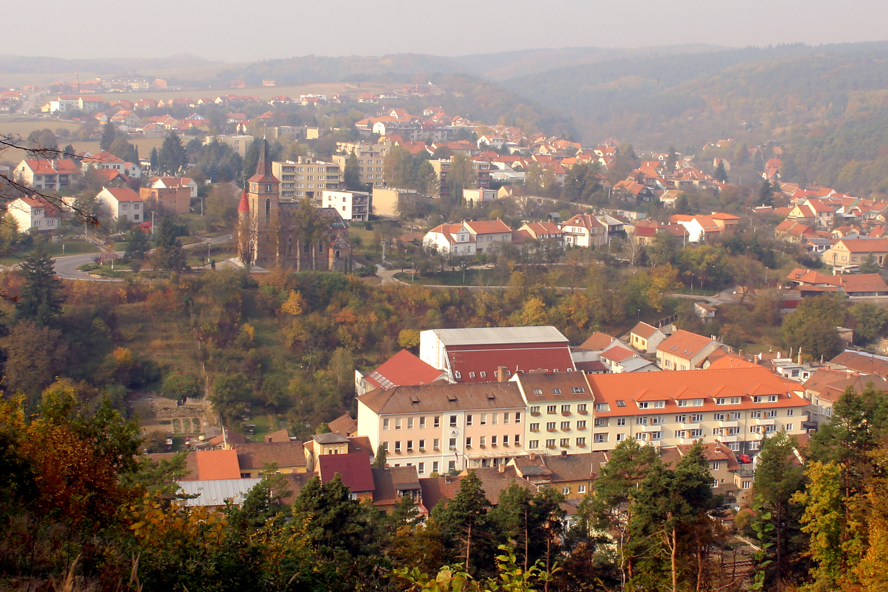 Podzimní pohled na Bílovice nad Svitavou